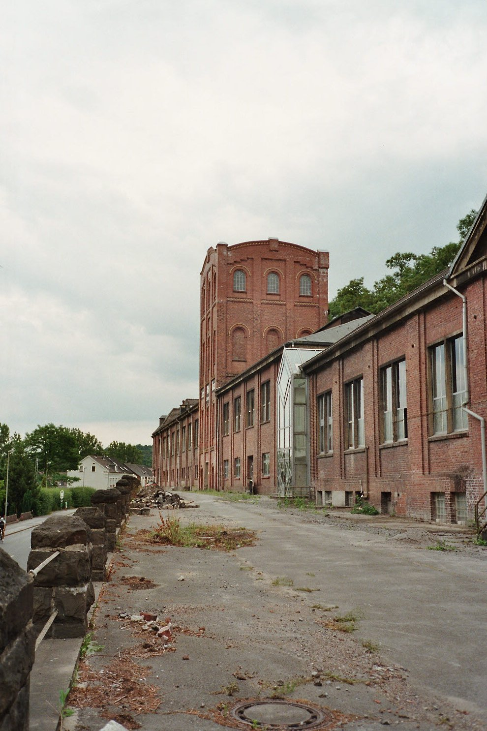 Schacht Julie der Zeche Alte Haase mit Malakowturm in Sprockhövel, Deutschland